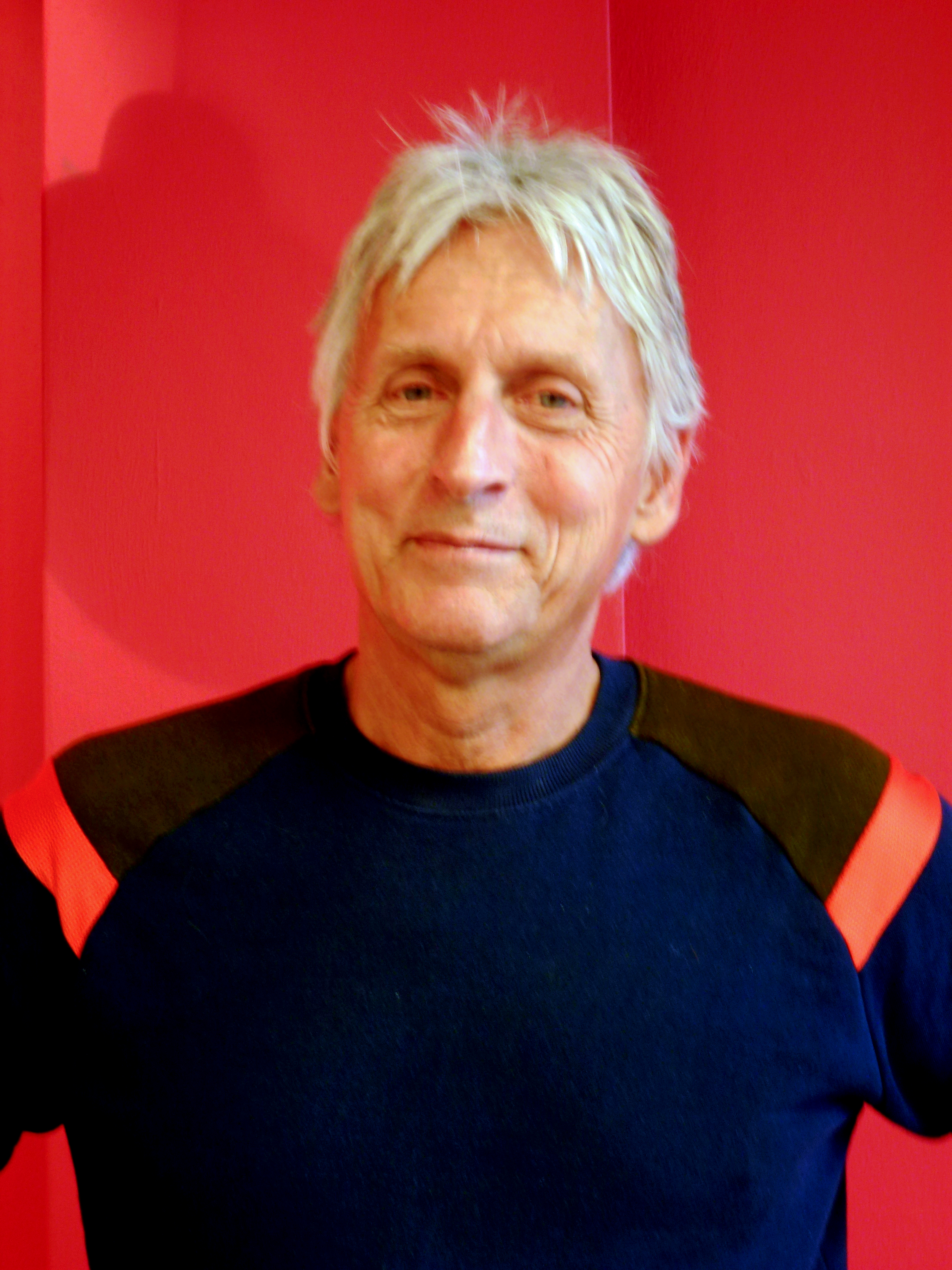 Harmen van Straaten is sinds 1987 werkzaam als illustrator van kinderboeken en sinds een aantal jaar ook als schrijver. De foto is gemaakt tijdens zijn kinderboekenweekvoorleesmiddag (2014) in de Goudse Bibliotheek aan Klein Amerika te Gouda